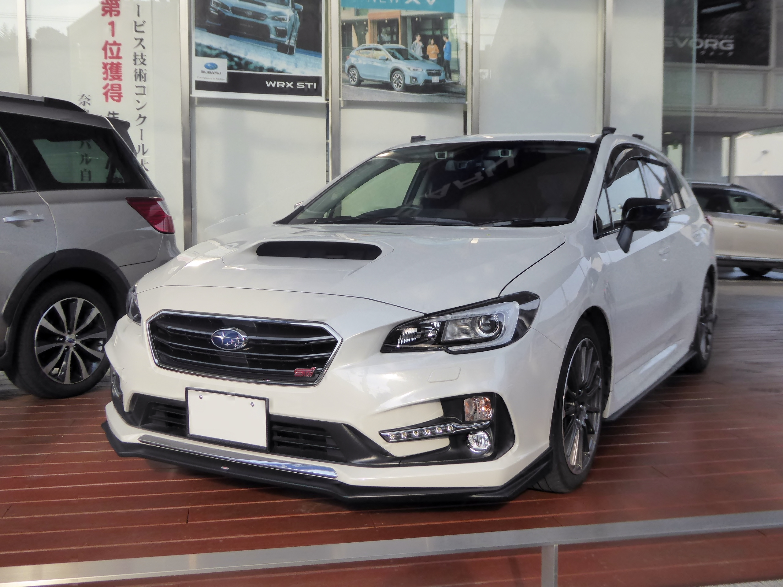 DBA-VM4型スバル・レヴォーグ1.6STI Sport EyeSightを撮影。